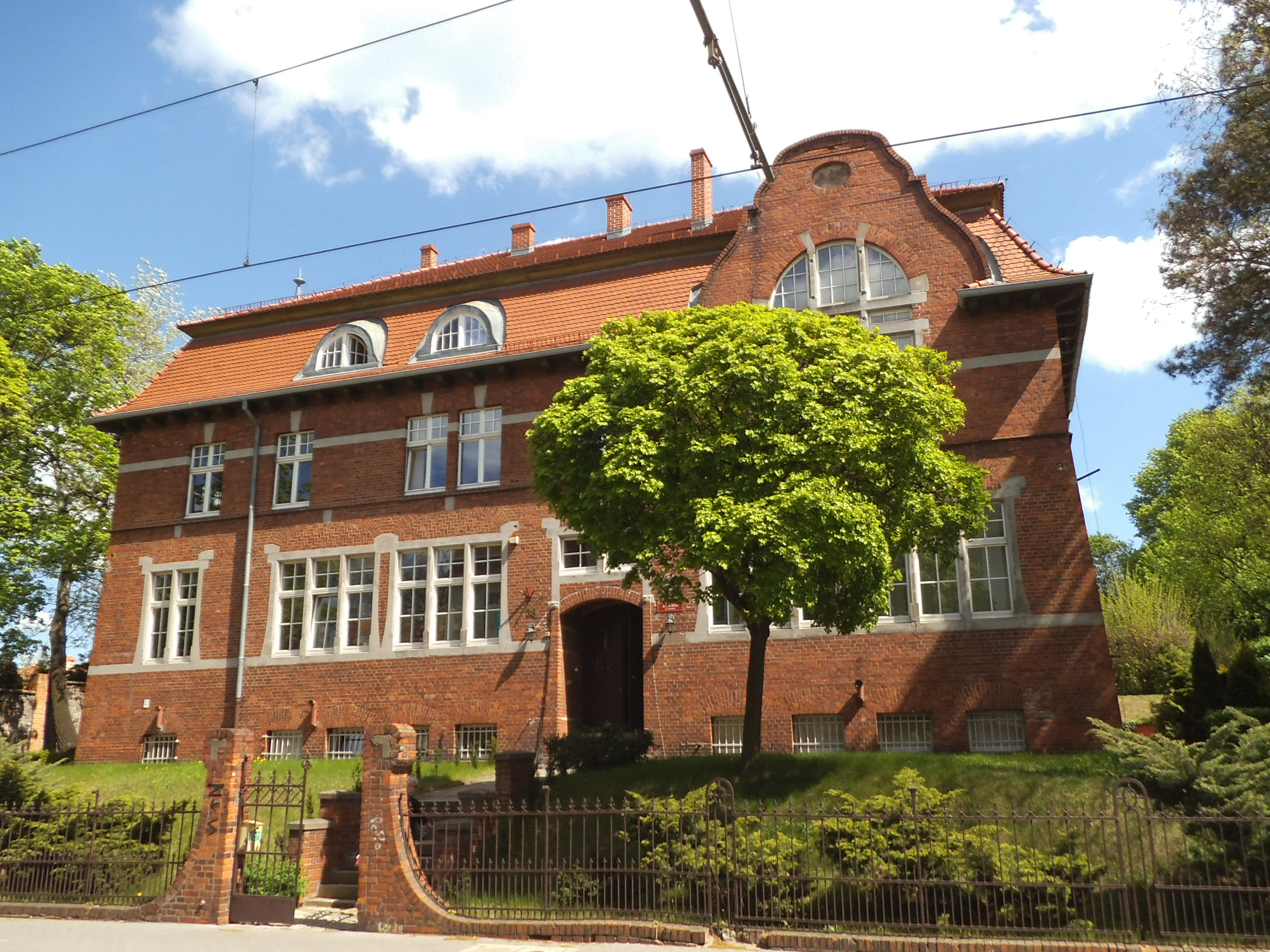 Nauczycielskie Kolegium Języków Obcych TORUN